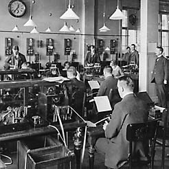 Wheatstone-Creed-avdelningen vid Stockholms telegrafstation 1915.